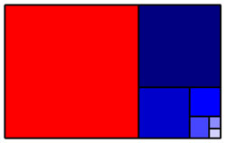 Incommensurabilité de la proportion d'extrême et de moyenne raison